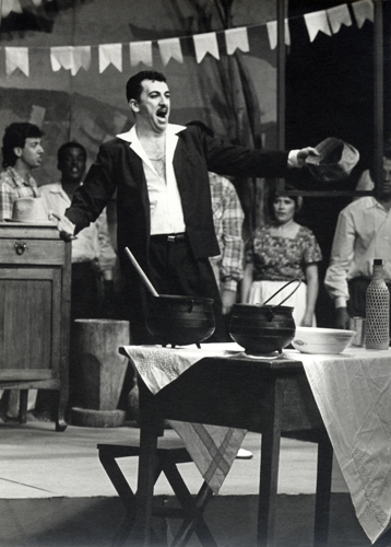 Renato Mismetti, no papel-título da ópera Pedro Malazarte, de Camargo Guarnieri - Mário de Andrade